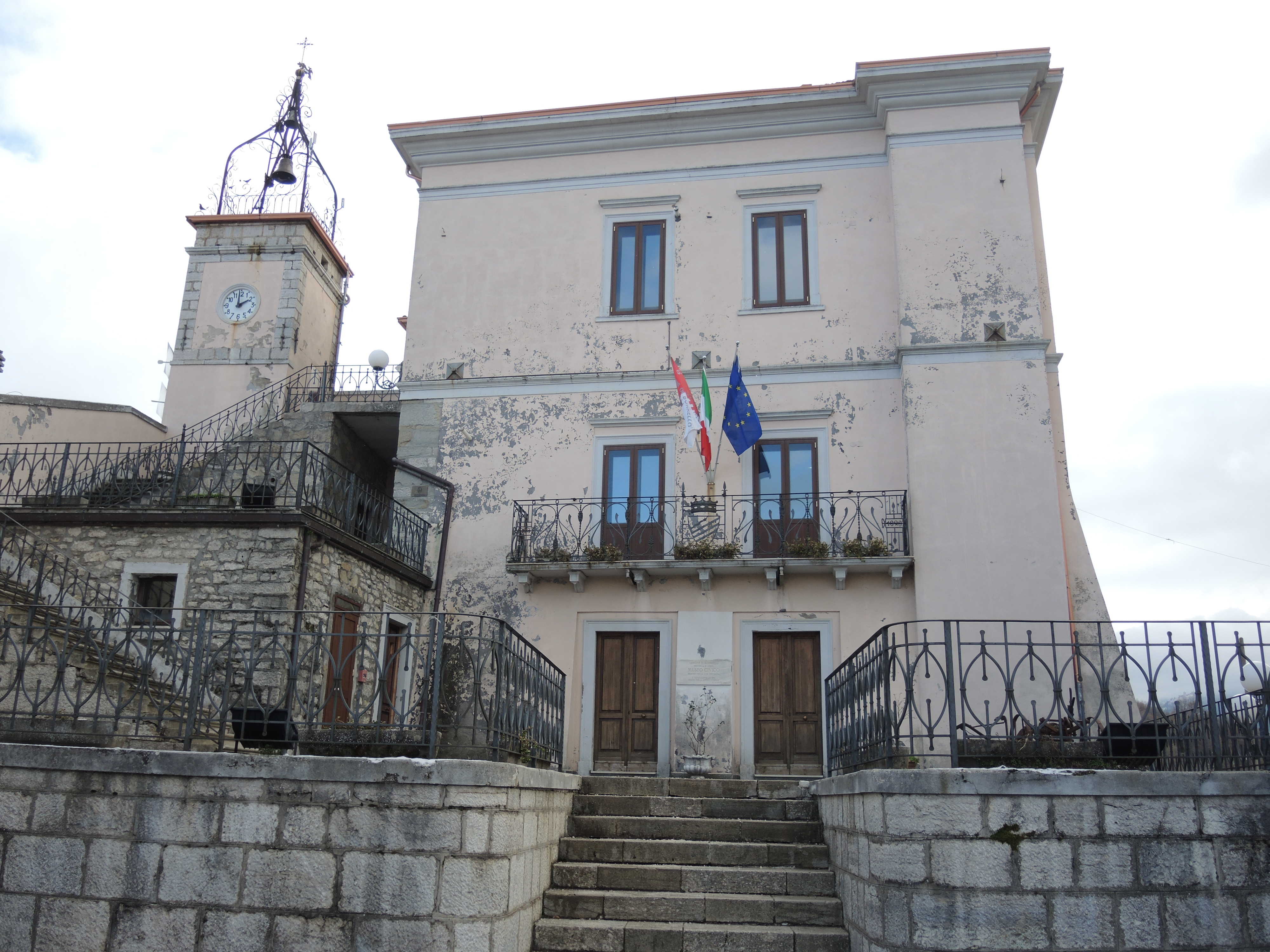 Borrello